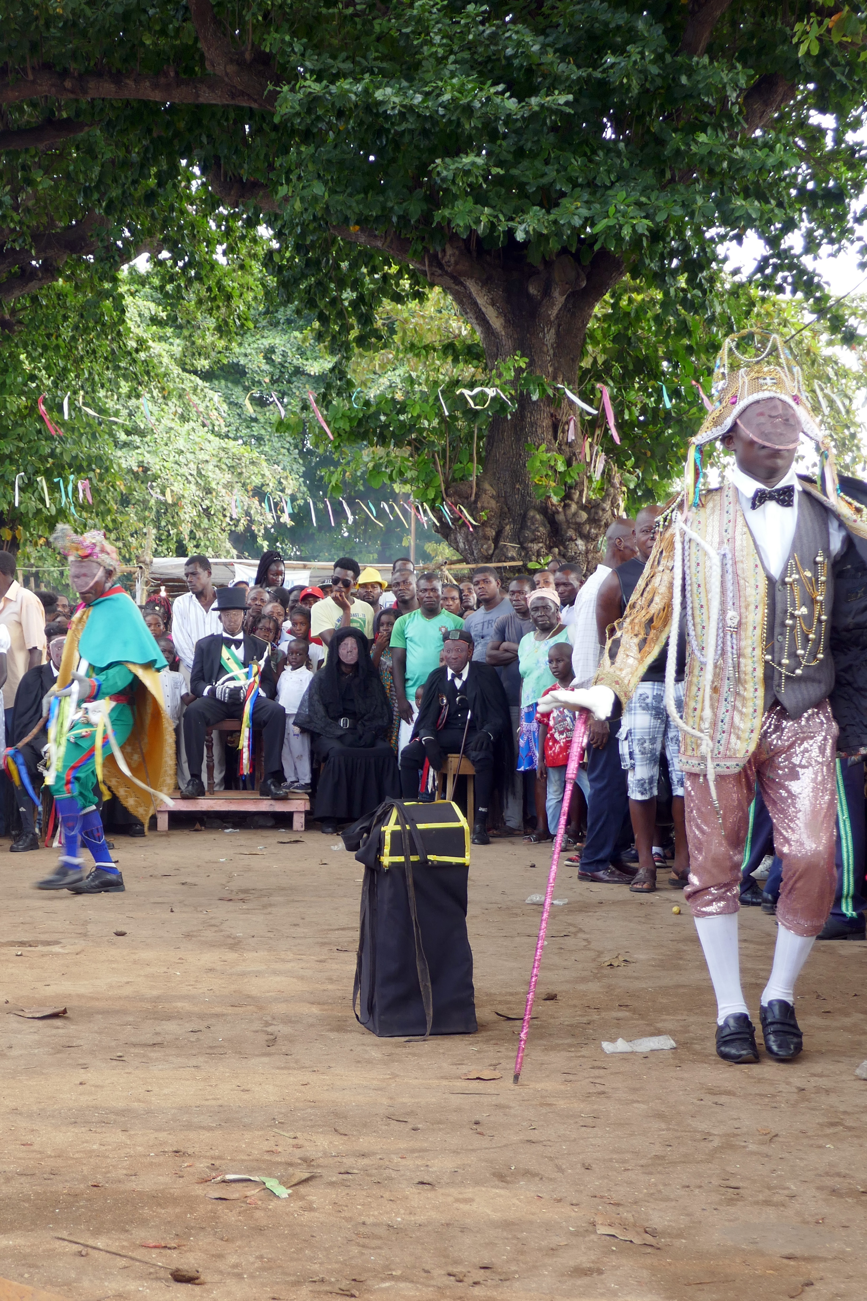 Tchiloli représenté devant l'église São Pedrão de São Tomé à l'occasion de la fête patronale. Le tchiloli est une forme théâtrale, musicale et dansée créée au XVIe siècle, jouée par des pêcheurs et des paysans. Traditionnellement elle met en scène la seule pièce du répertoire, La tragédie du marquis de Mantoue et de l'empereur Charlemagne". This is an image with the theme "Play" from: Sao Tome and Principe